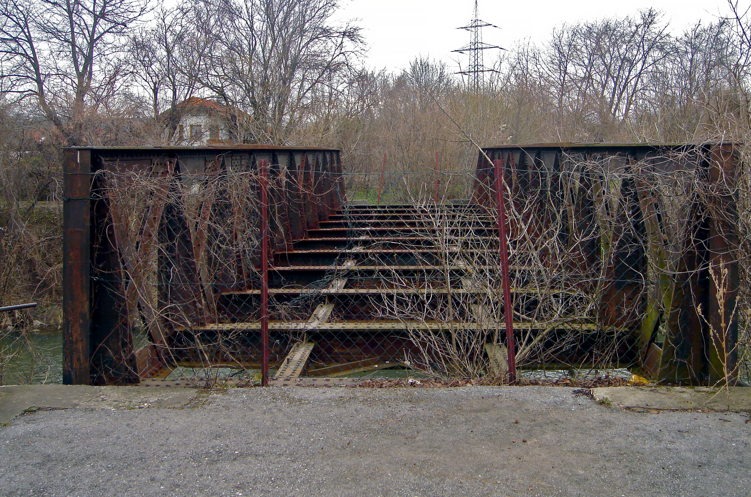 Enzesfeld(-Lindabrunn), Niederösterreich, Brücke (aus 1917) der 1978 abgebauten Schleppbahn Bahnhof Enzesfeld–Hirtenberger Patronenfabrik